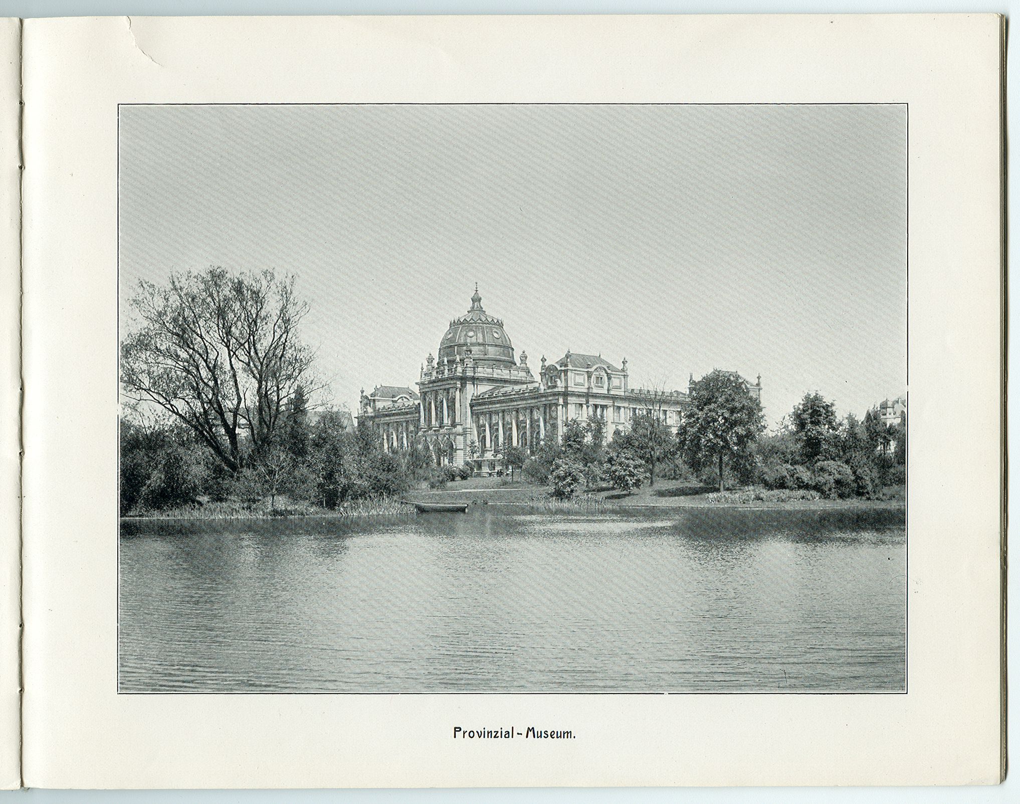 „Hannover – 26 Ansichten nach künstlerischen Aufnahmen“ von Karl F. Wunder. – Provinzial-Museum.